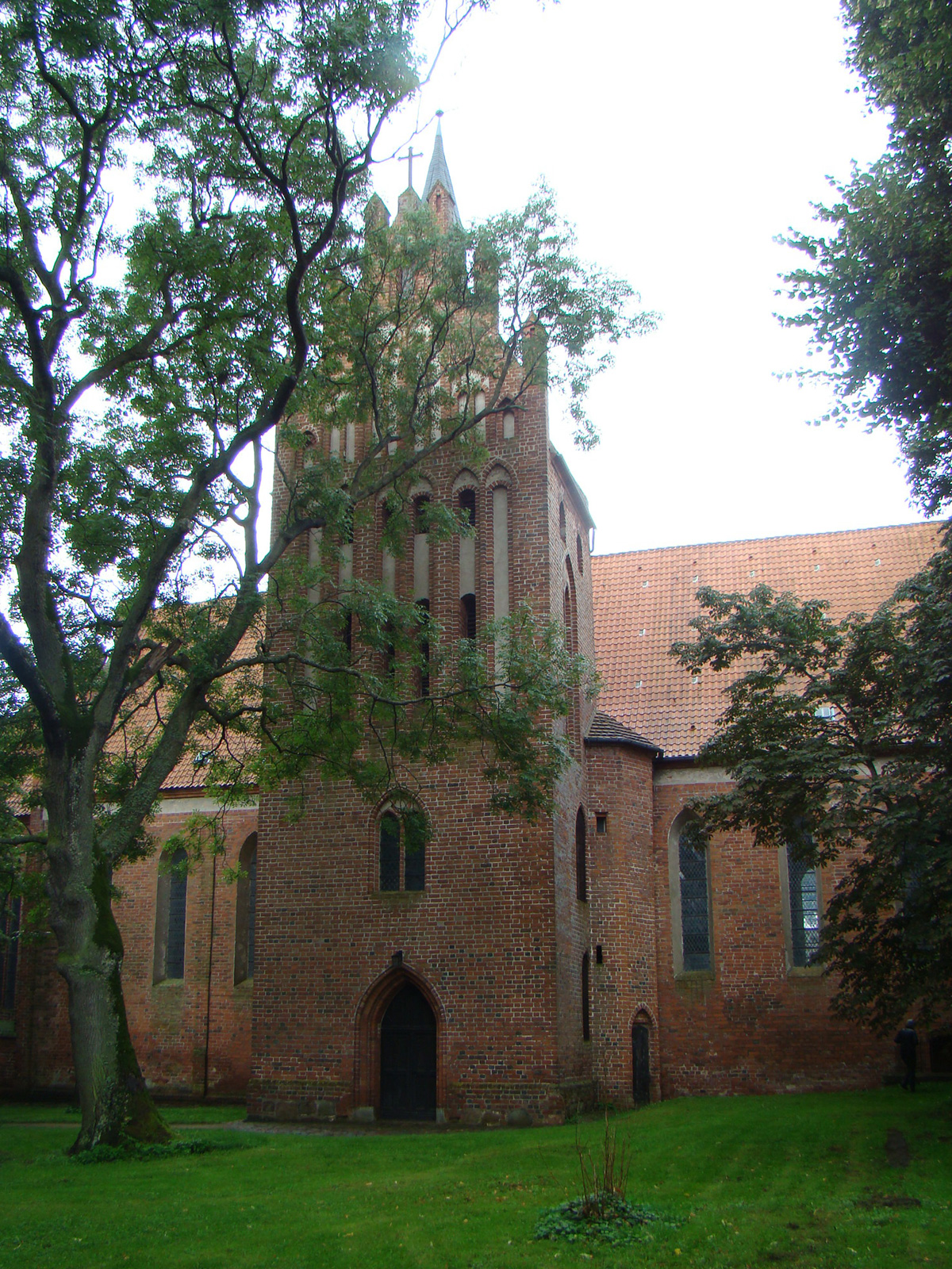 Ehem. Klosterkirche in Verchen